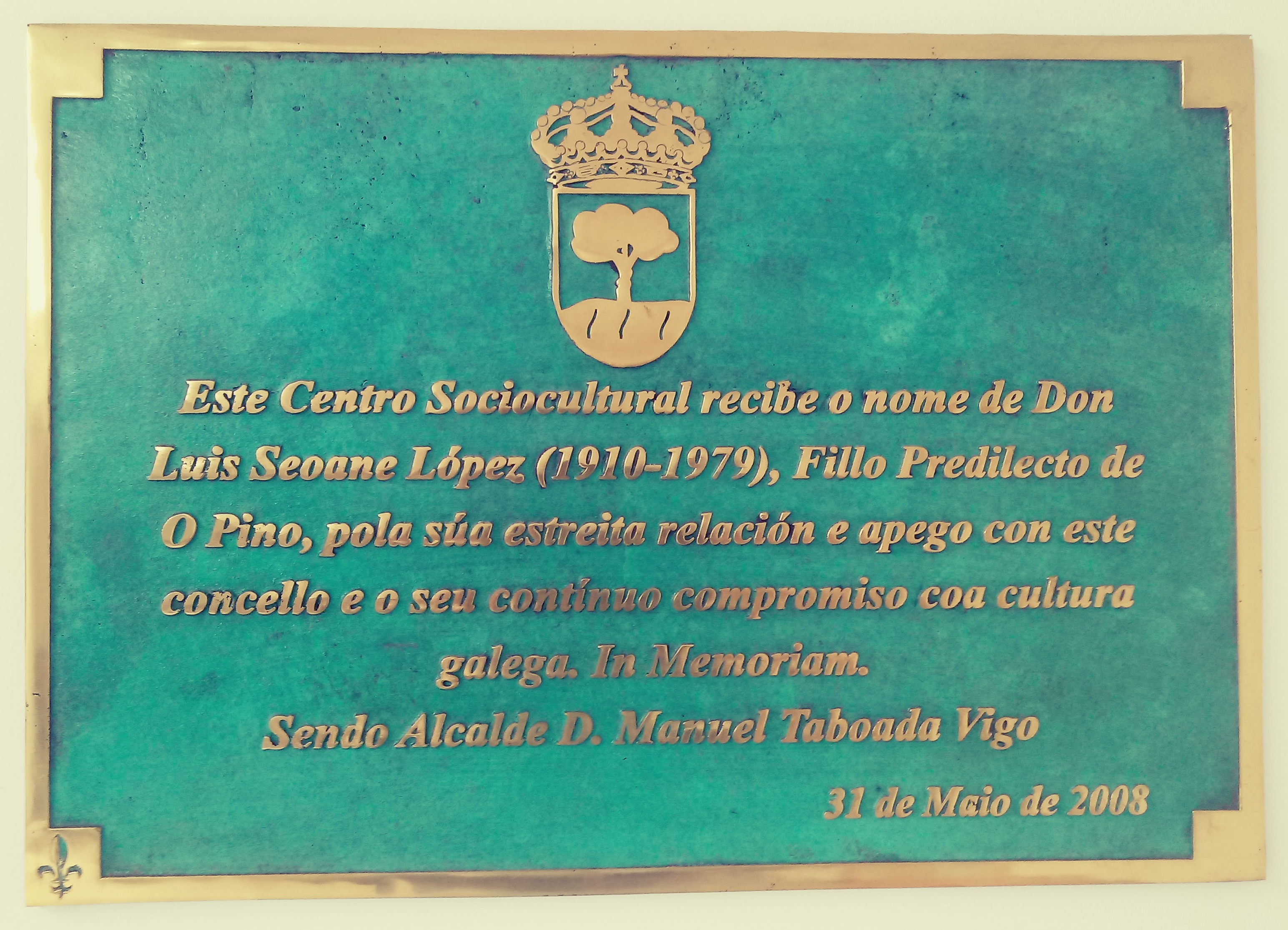 Placa de inauguración do CSC Luís Seoane en 2008